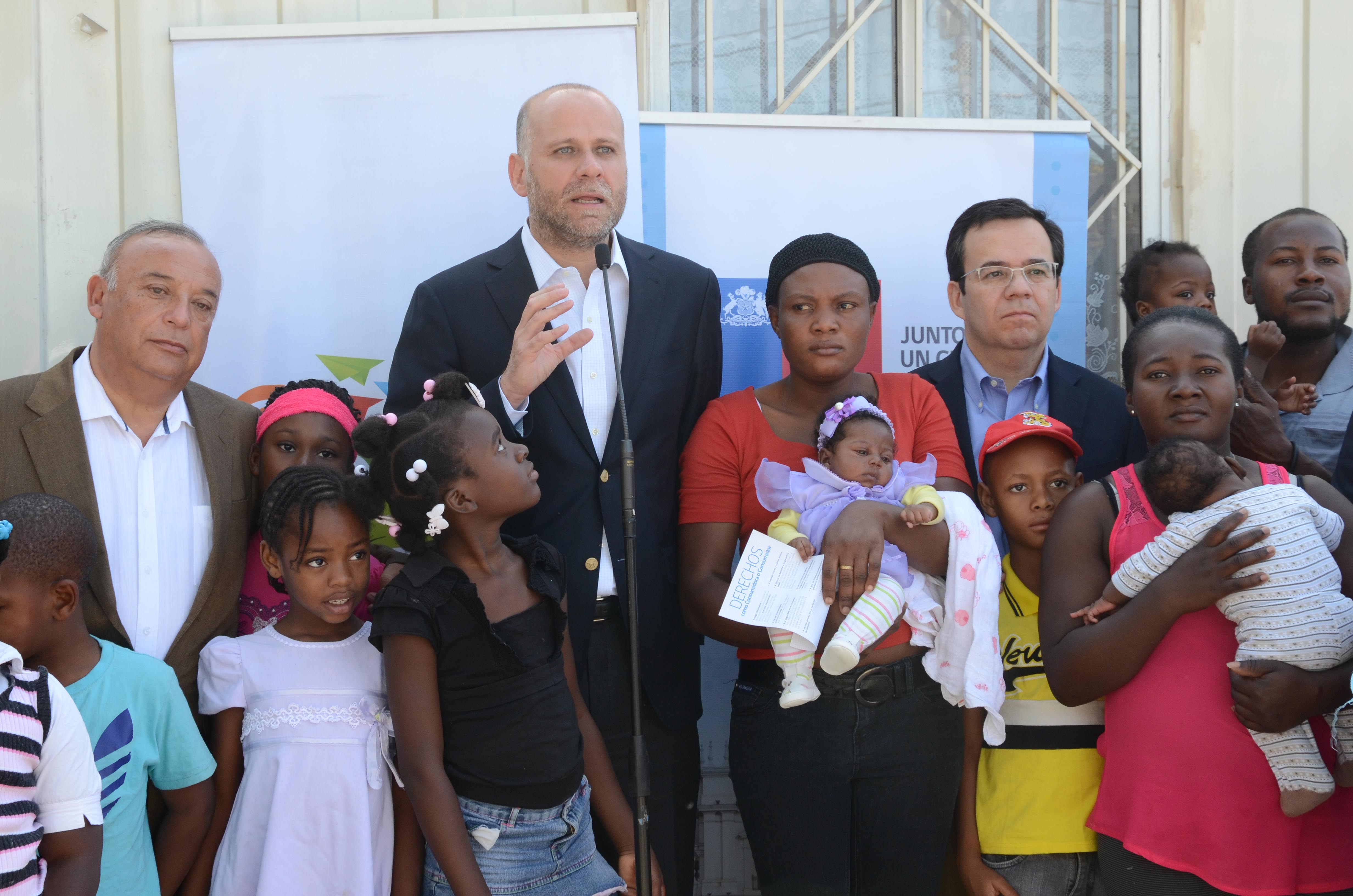 Ministro Elizalde participa en desayuno de conmemoración por el Día Internacional contra la Discriminación